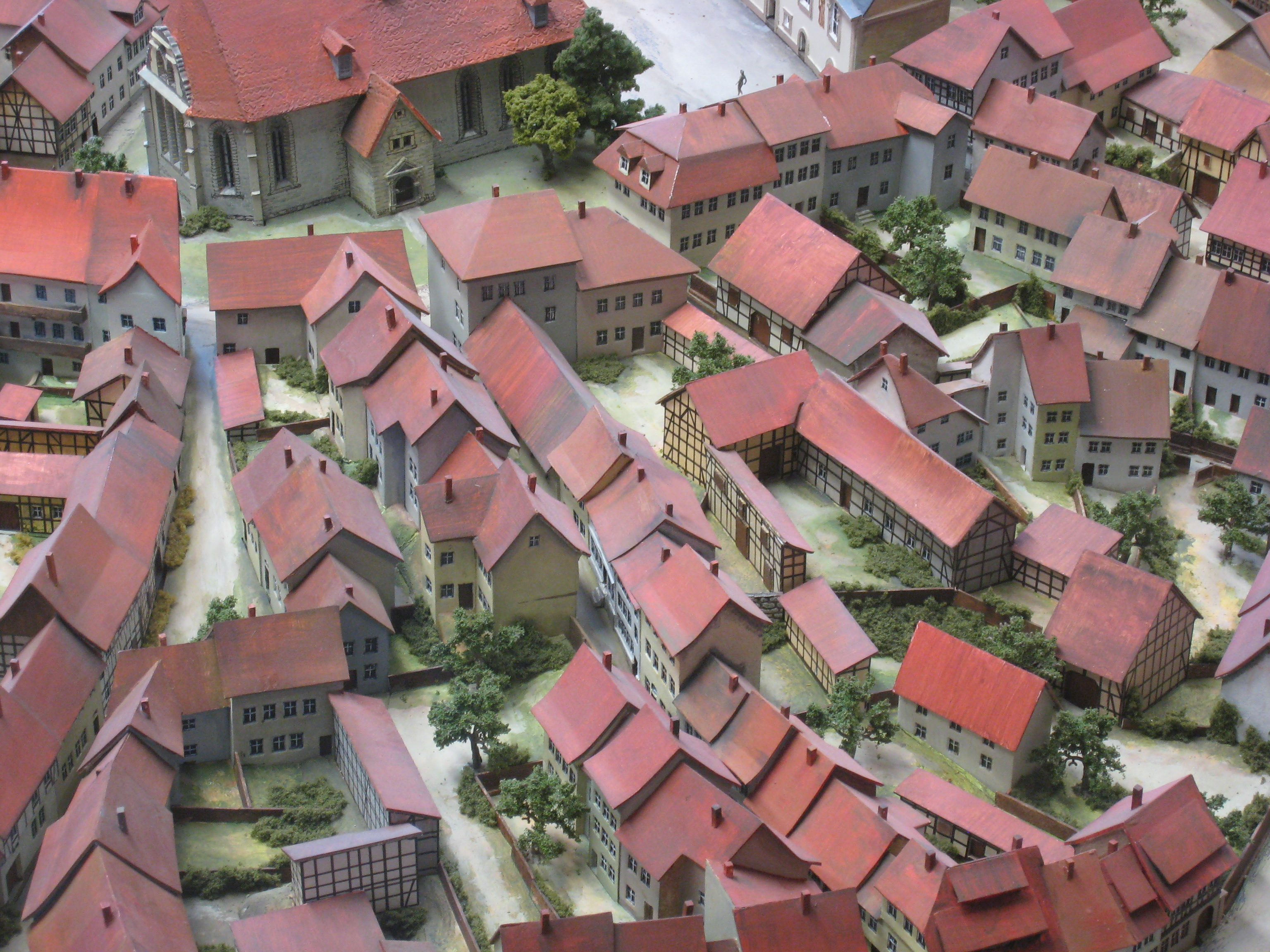 Gassen hinter der Bachkirche in Arnstadt, nach 1980 von fortschrittlichen sozialistischenPolitikern zerstört!